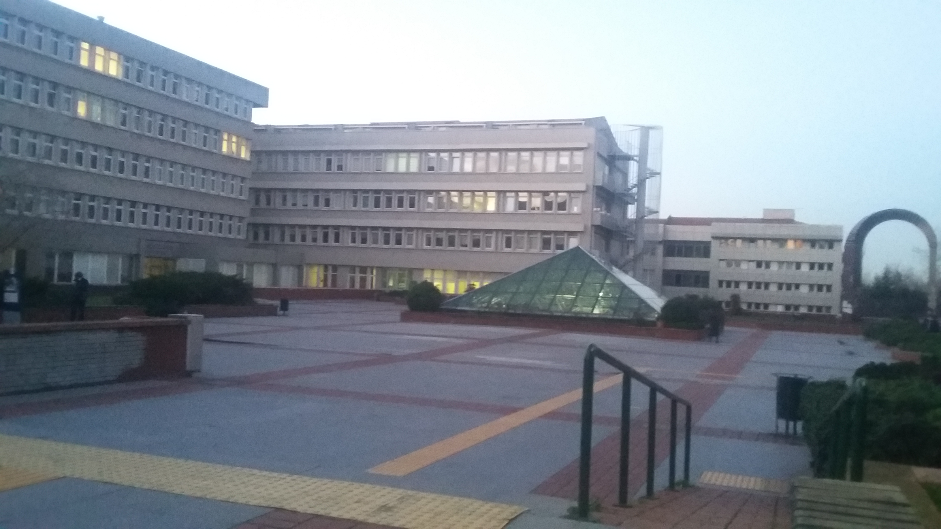 Boğaziçi Üniversitesi Aptullah Kuran Kütüphanesi merkezinden bir görüntü.